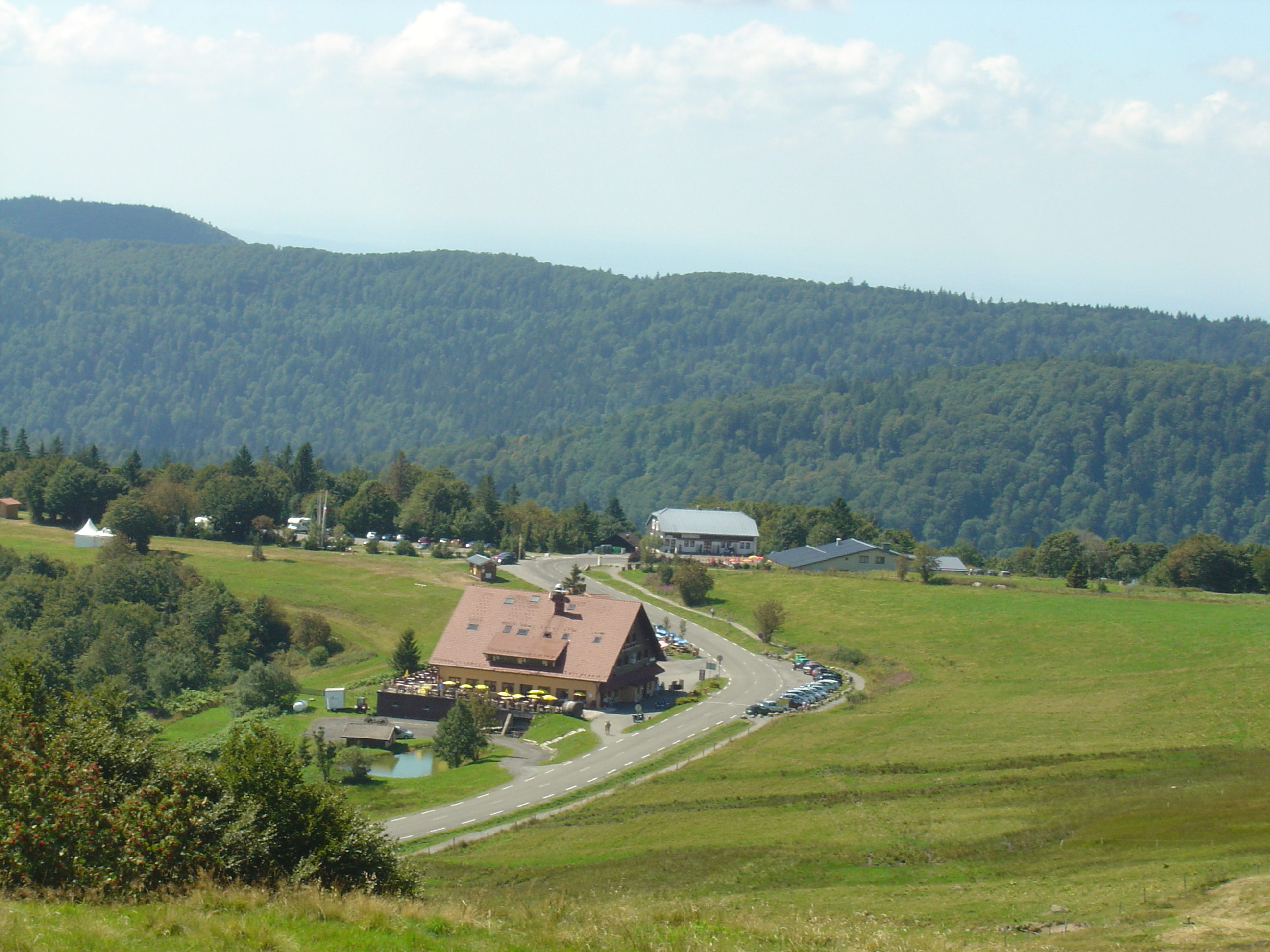 Boutiques, restaurants au sommet du col du Ballon d'Alsace